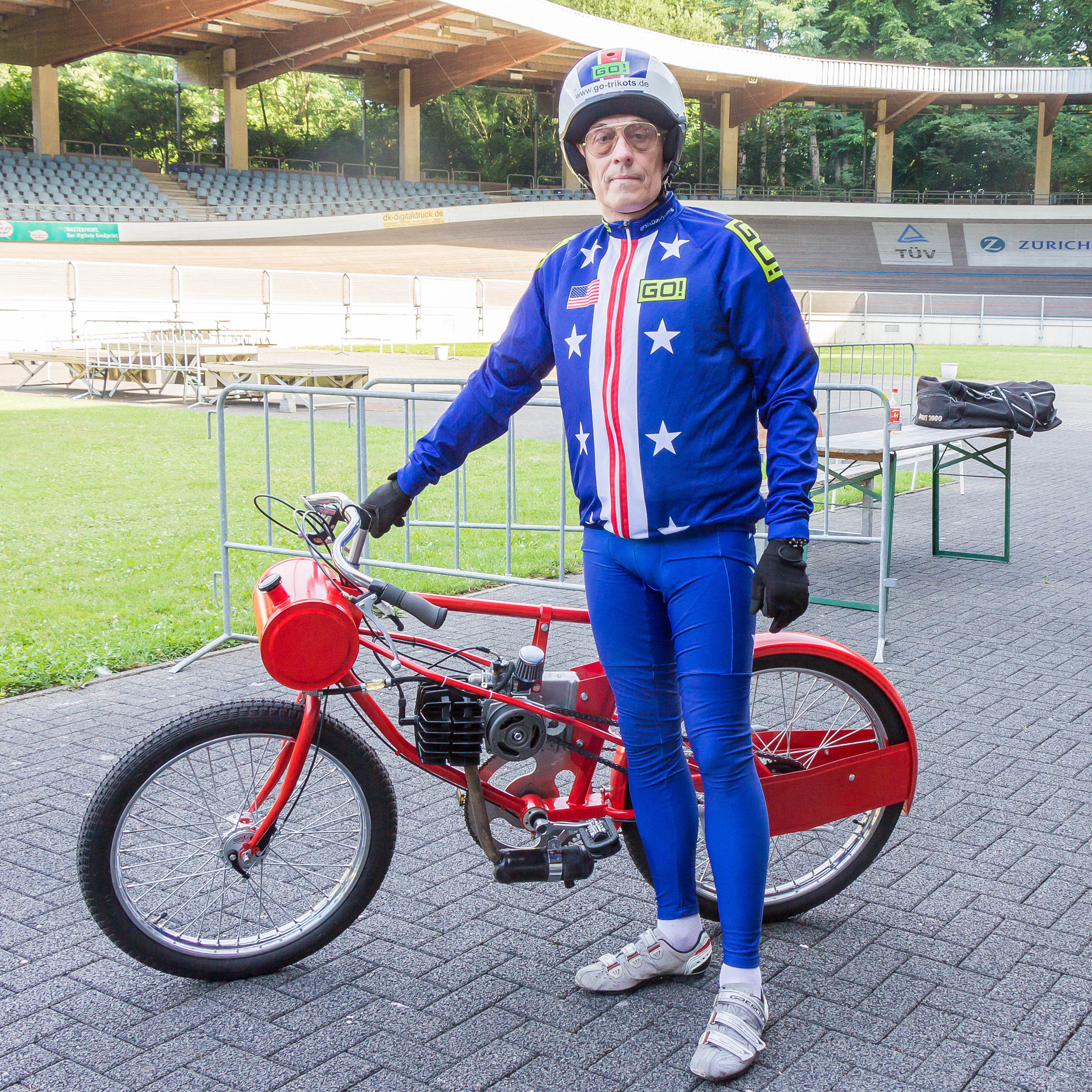 Peter Bäuerlein im Radstadion Köln mit einem Derny-Motorrad